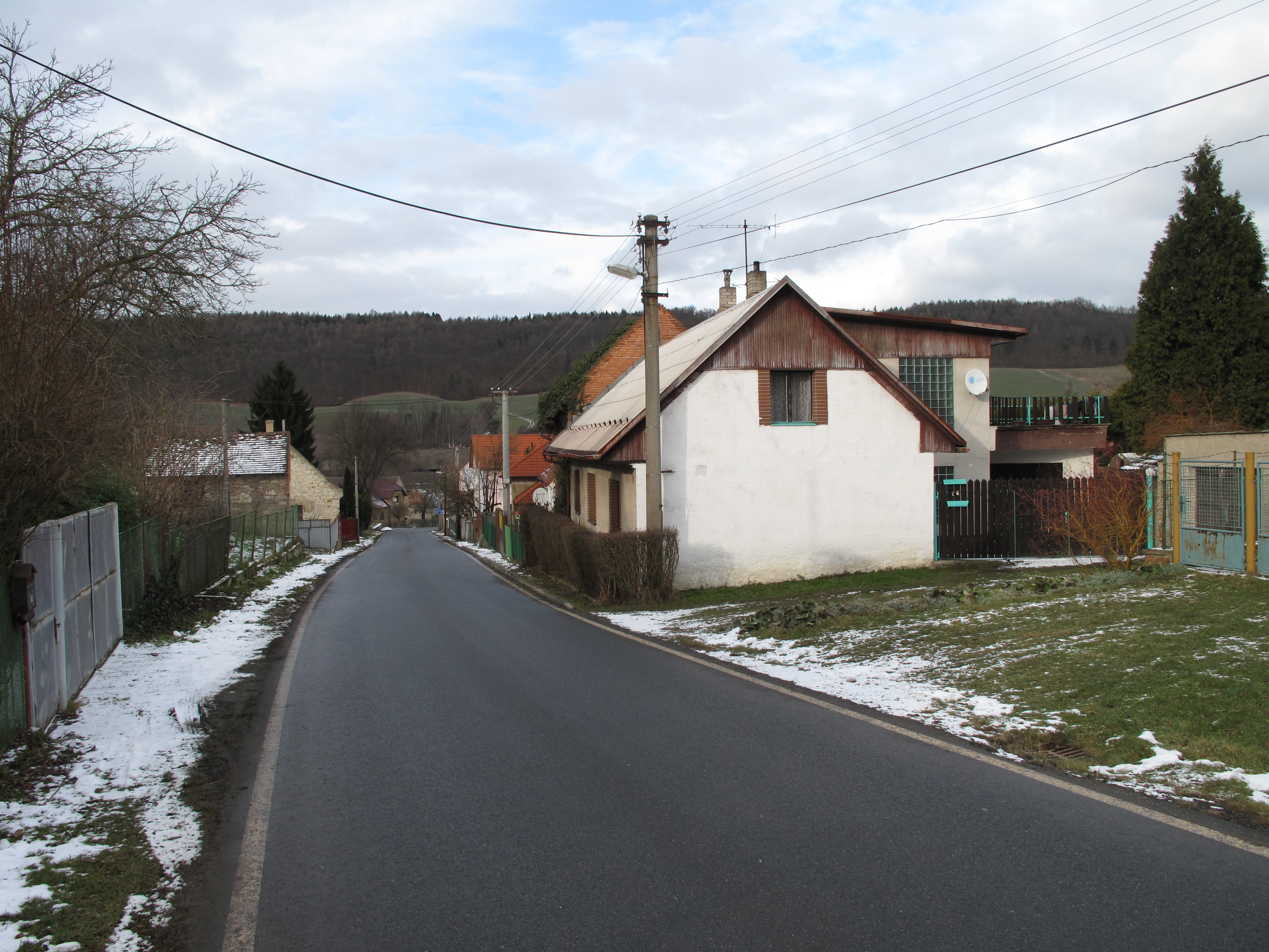 Ulice v Přerubenicích. Okres Rakovník, Česká republika.